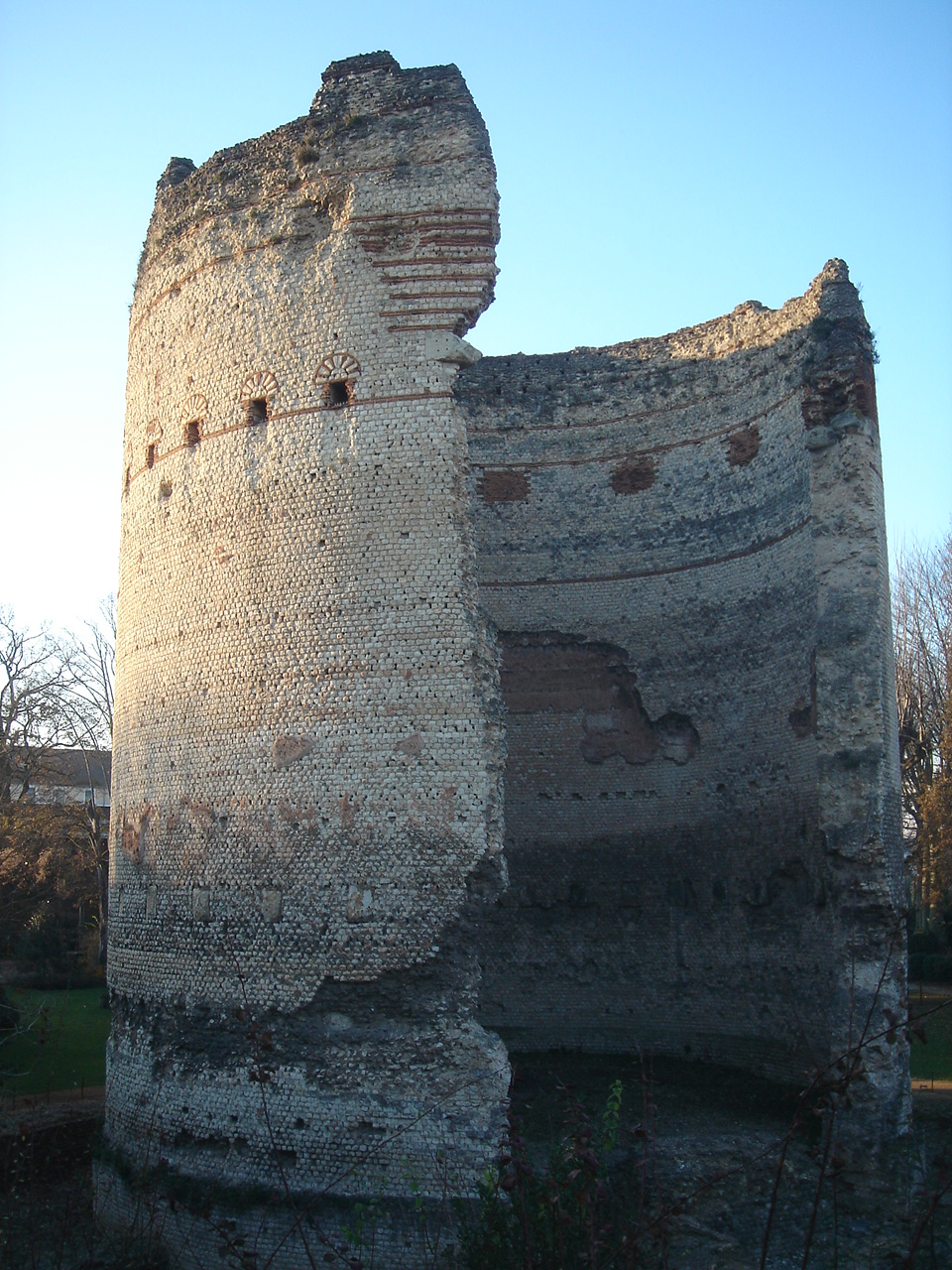 Der "Tour de Vésone" in Périgueux: Es handelt sich um die Ruine eines Heiligtums, das in römischer Zeit (2. Jh. n. Chr.) zu Ehren einer lokalen Schutzgöttin errichtet wurde.